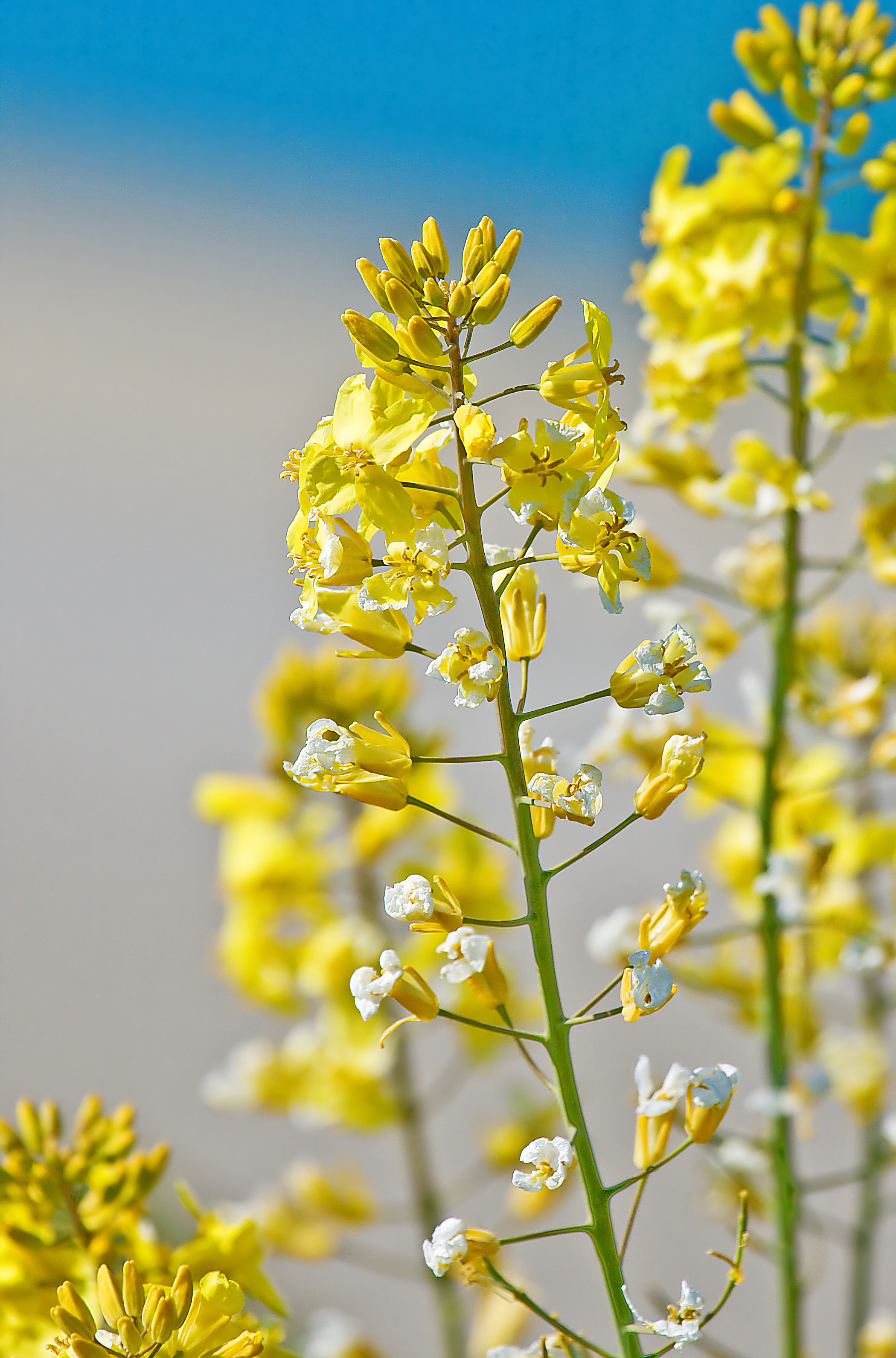 Brassica oleracea var. oleraceae. Klippenkohl (Wildkohl), Stammform der Kulturkohlsorten, Blütenstand